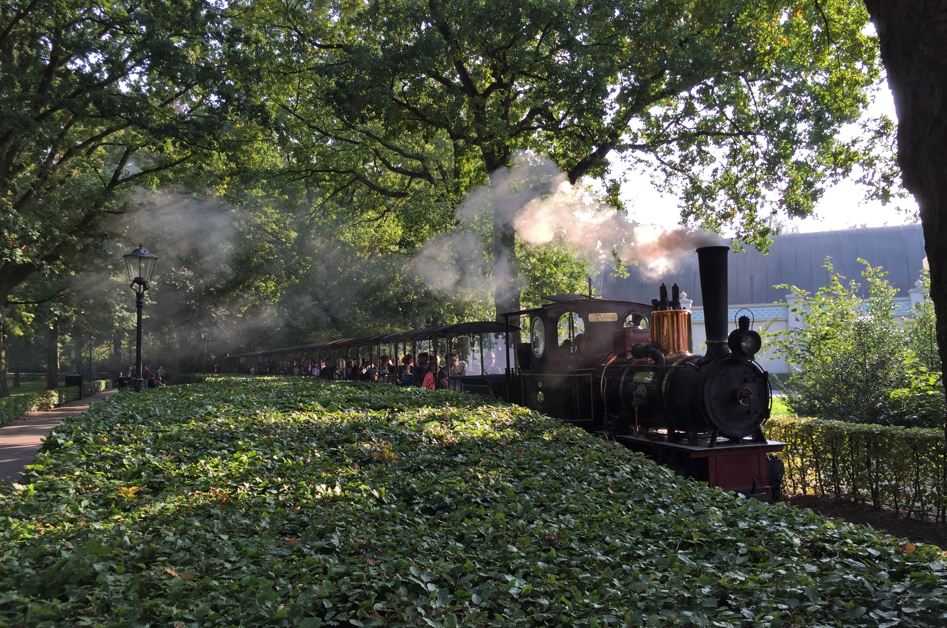 Stoomtrein Moortje. De Stoomtrein is sinds 1969 één van de attracties in Attractiepark de Efteling te Kaatsheuvel. Efteling Stoomtrein Maatschappij telt vijf locomotieven: 'Aagje' (bouwjaar 1911, in de Efteling sinds 1968), 'Moortje' (bouwjaar 1908, in de Efteling sinds 1974), 'Neefje' (bouwjaar 1914, in de Efteling sinds 1981), 'Trijntje' (bouwjaar 1992), en 'Dieseltje' (deze rijdt vroeg in de ochtend, als de stoomlocomotieven nog op temperatuur moeten komen). 'Moortje'. Deze loc was door Orenstein & Koppel gebouwd en wel in 1908 (fabrieksnummer 2697). Zij werd overgenomen van een sloper in Brussel en was niet meer dan een hoop oud ijzer. Na een grote herstelling, inclusief een nieuwe ketel en een nieuwe tender, kon de loc in 1974 in dienst gesteld worden. Vanwege de zwarte kleur werd de loc 'Moortje' gedoopt.